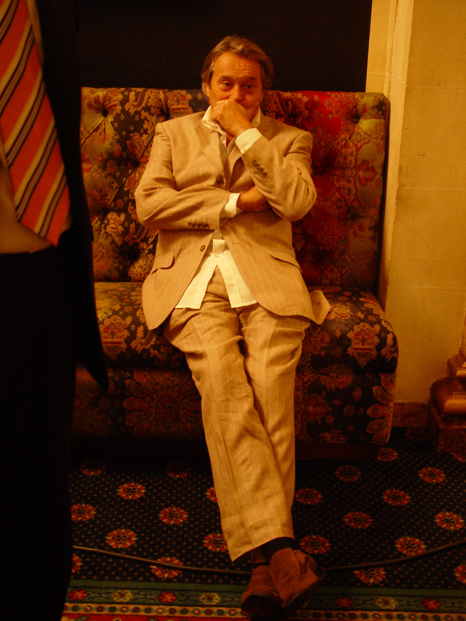 Patrick Bouchitey, repos entre deux prises de vues.